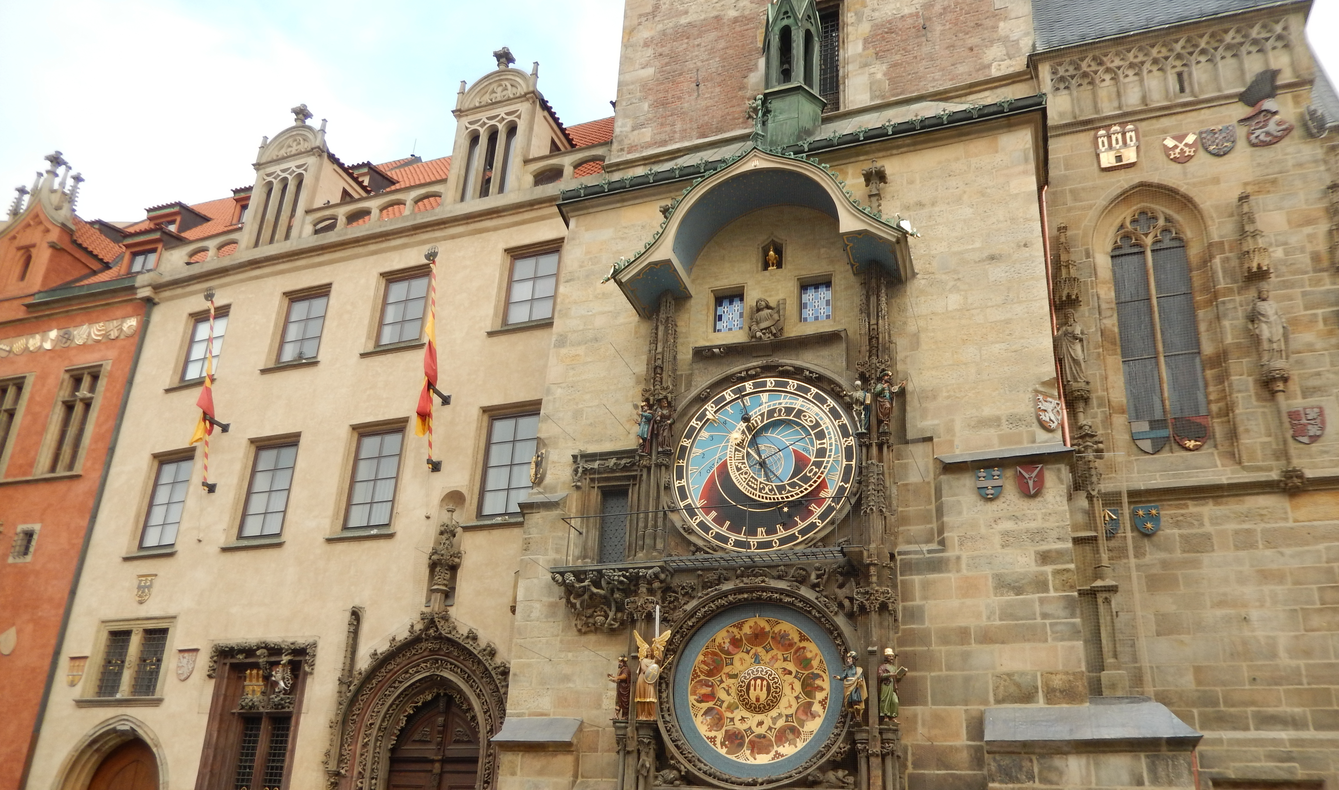 Astronomical clock , Old Town Hall Tower, Prague